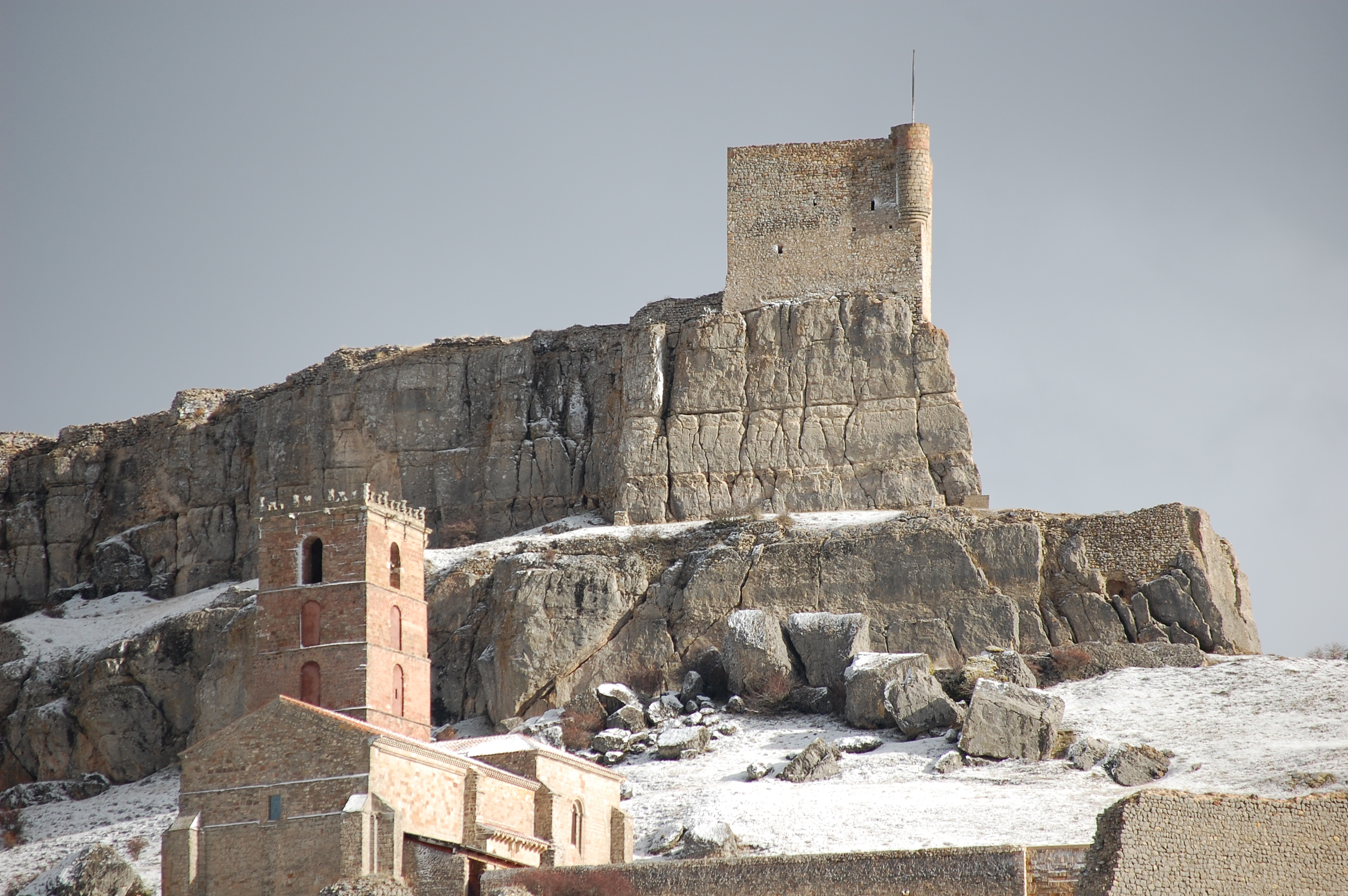 Atienza(5)